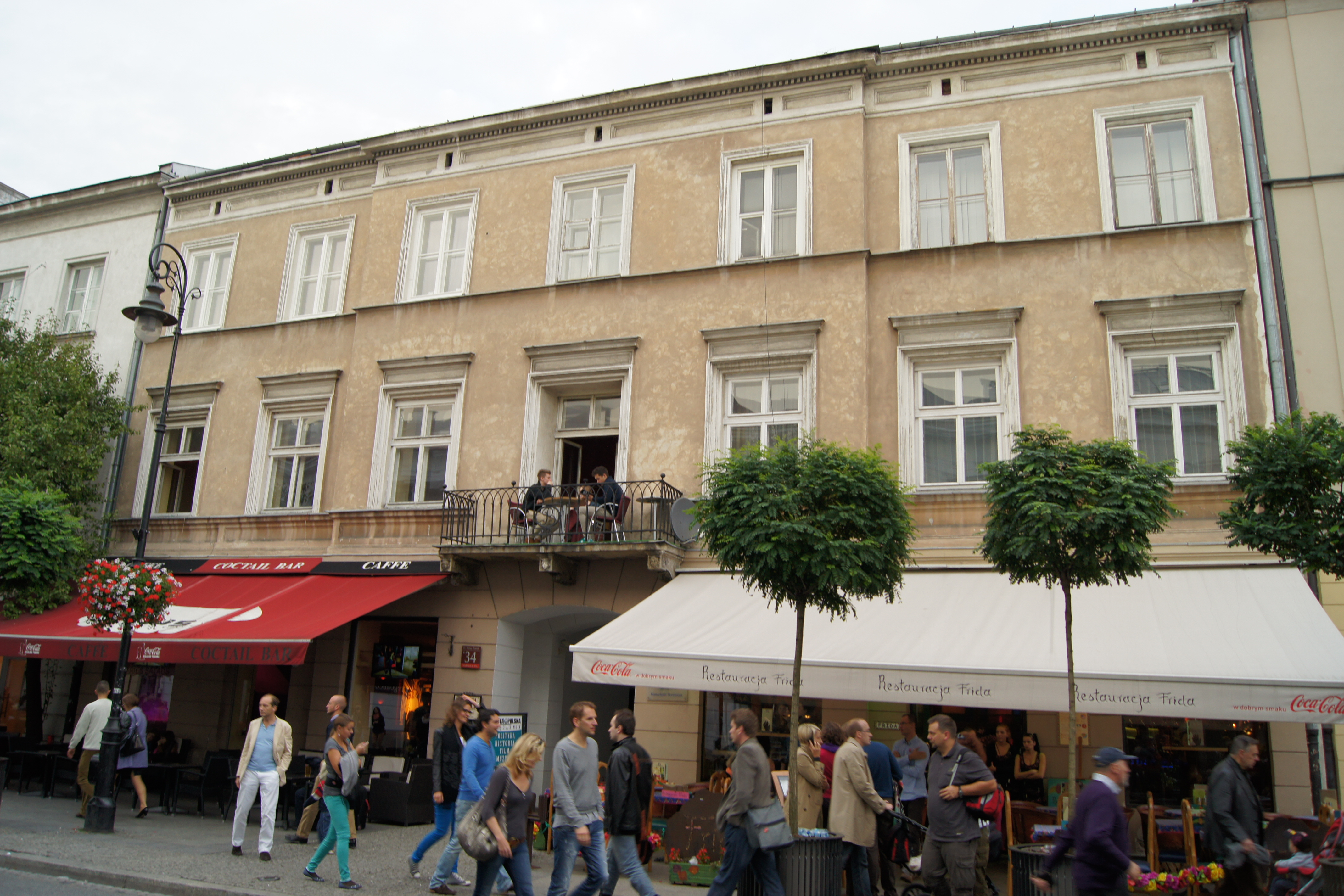 kamienica, ul. Nowy Świat 34, Warszawa, dz. Śródmieście